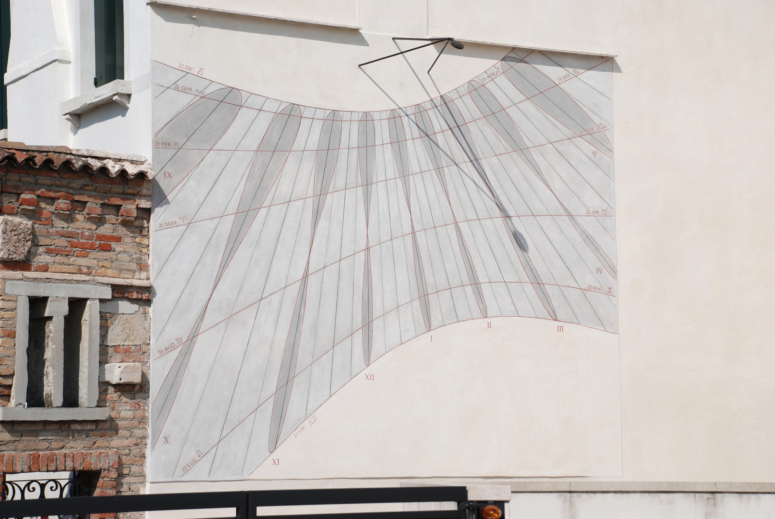 meridiana ottocentesca di grandi dimensioni disegnata sulla facciata sud-ovest di Palazzo Muletti a Oderzo (TV).